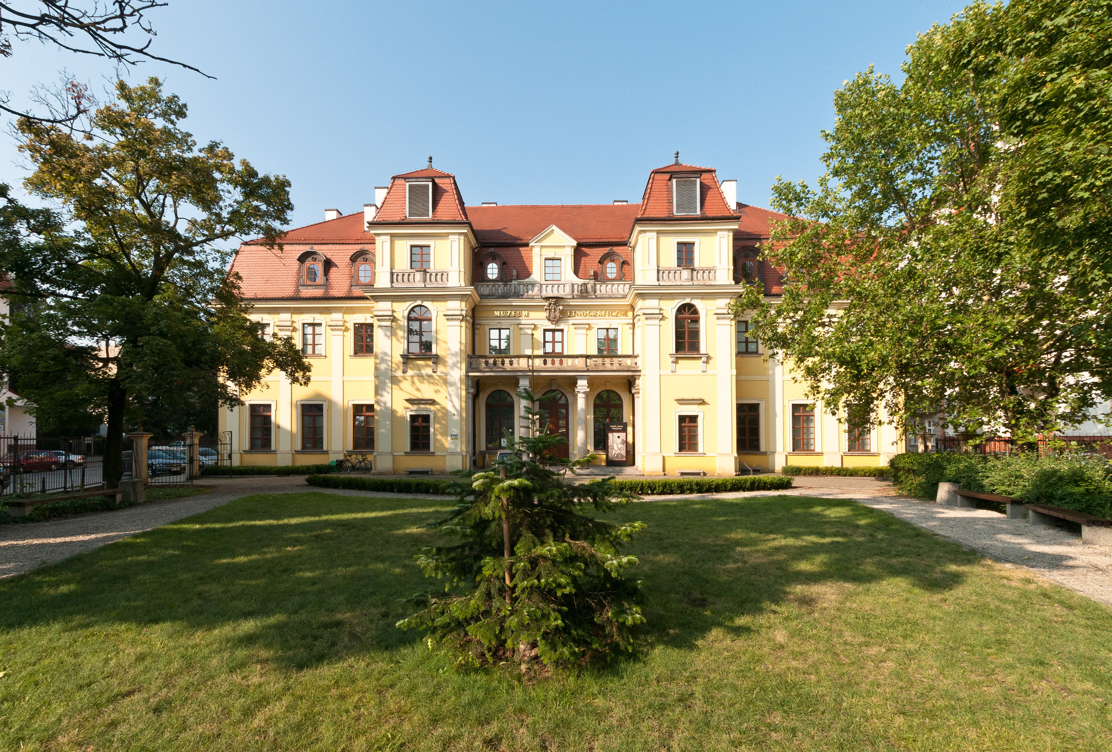 Wrocław, pl Zgody - Muzeum Etnograficzne (zabytek nr A/2793/182)